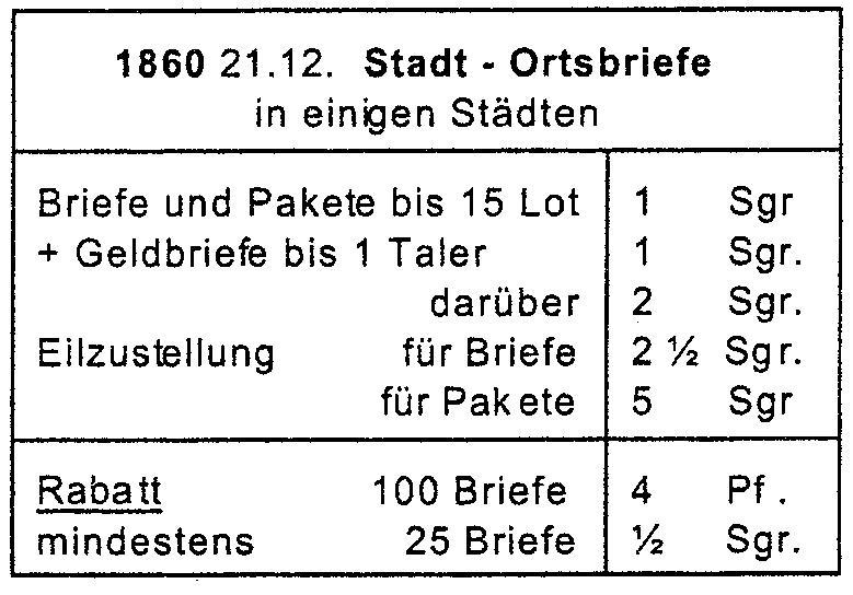 Preußisches Ortsporto